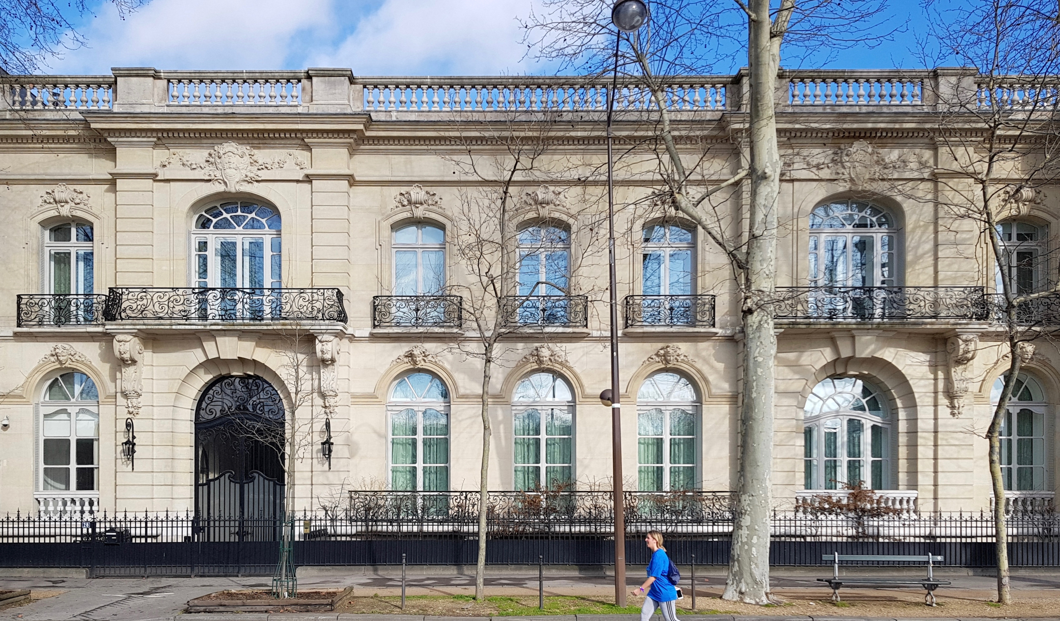 Hôtel Sourdeval-Demachy, 28 avenue de New-York, Paris, 16e.